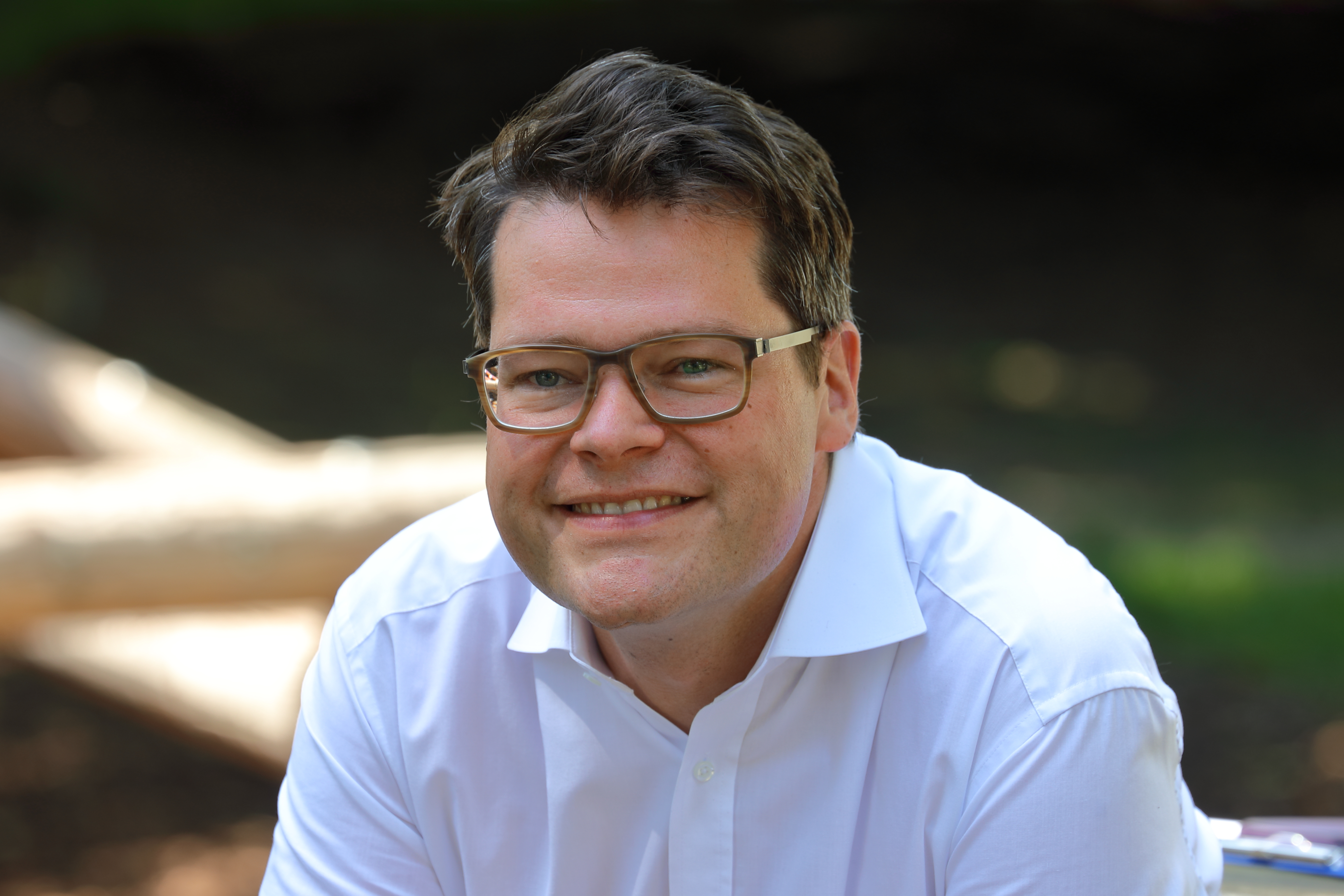 Der österreichische Politiker Jürgen Czernohorszky beim Fototermin „Summer City Camp“ in der Volksschule Hütteldorf 14. Wiener Gemeindebezirk Penzing.